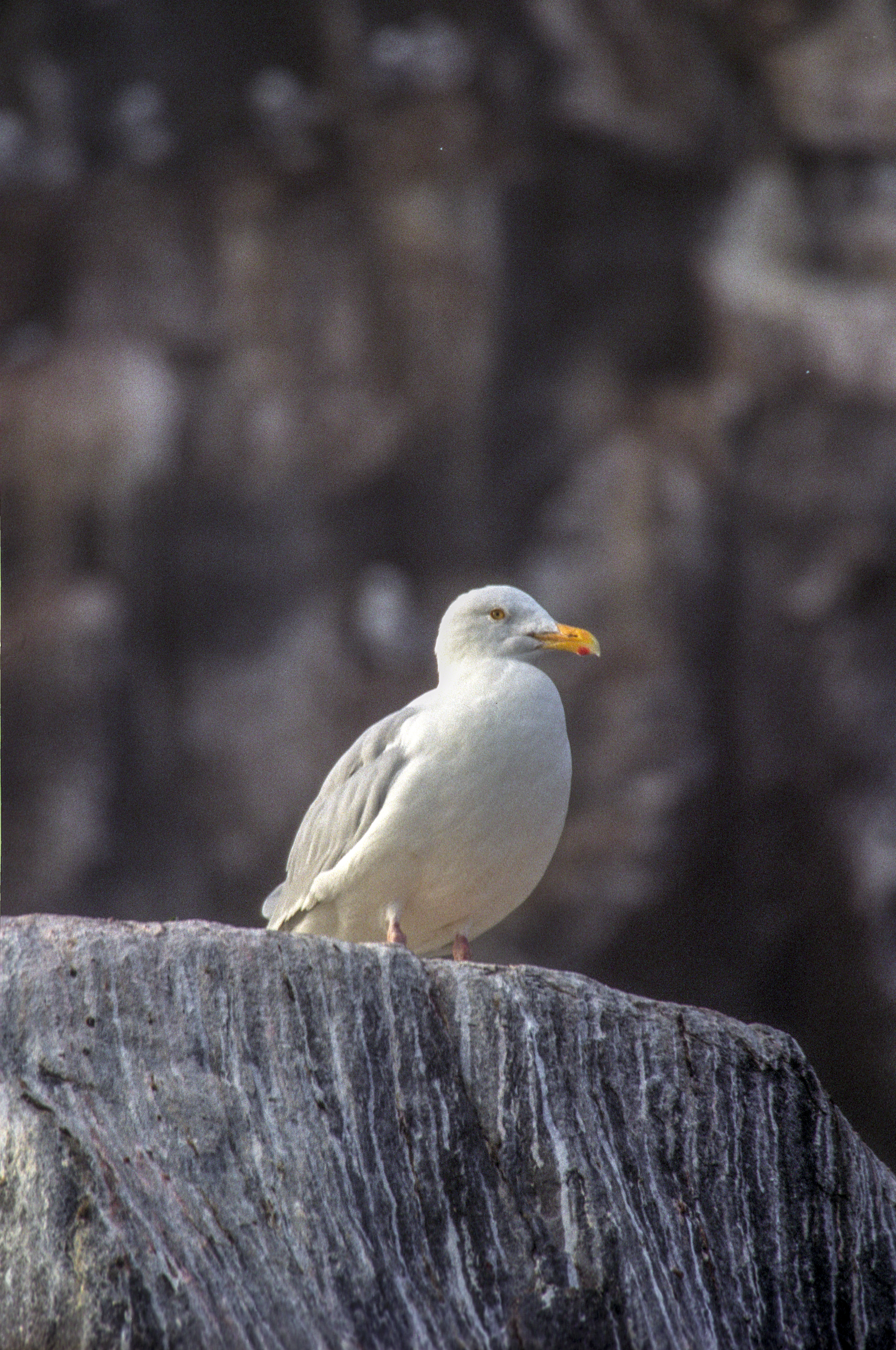 Spitsbergen, Alkefjellet, Mewa blada (Larus hyperboreus)